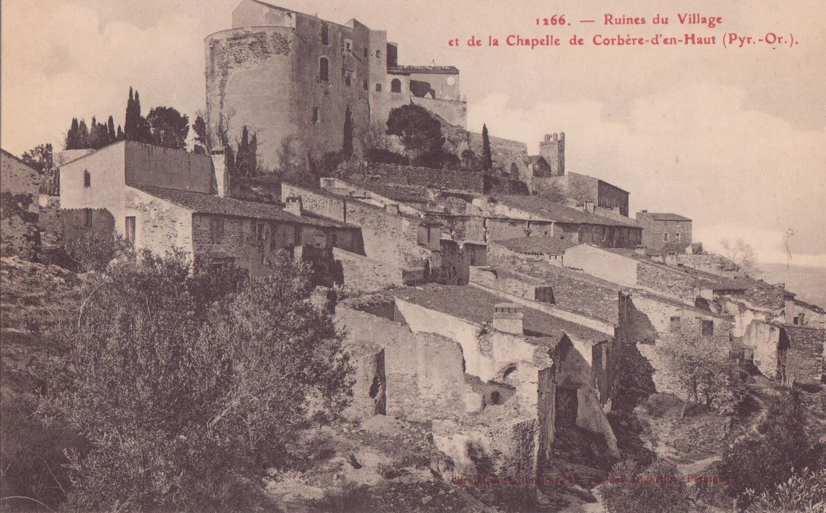 Carte postale de Corbère-d'en-Haut (Corbere de Dalt) vers 1900-1910